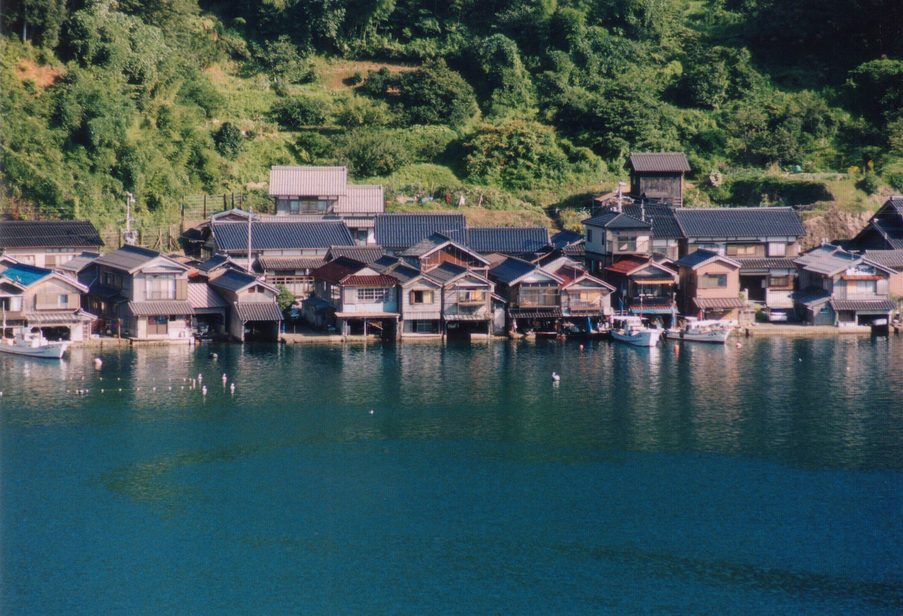 Funaya of Ine village, Kyoto, Japan